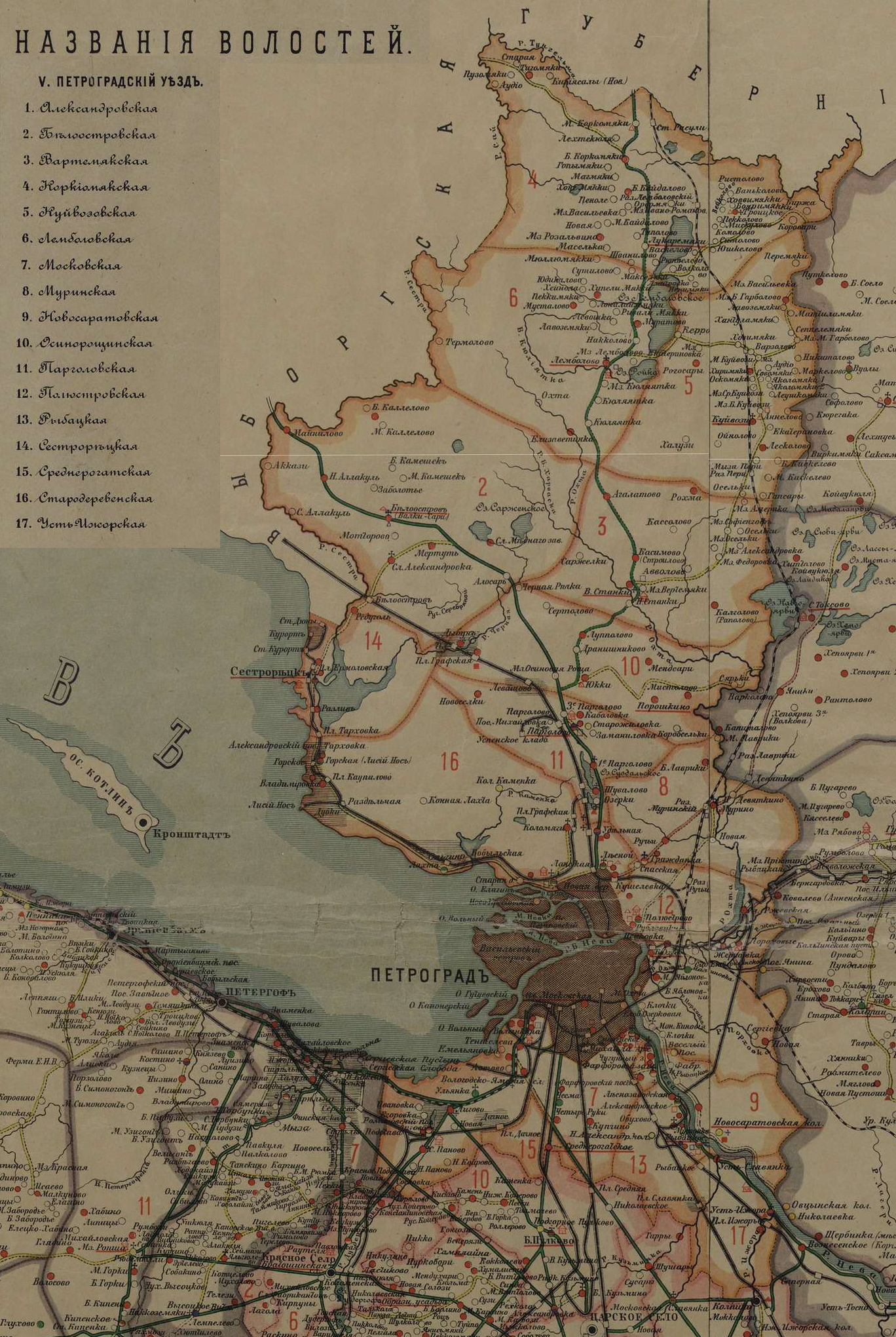 Петроградский уезд с разделением на волости на карте Петроградской губернии 1916 года.